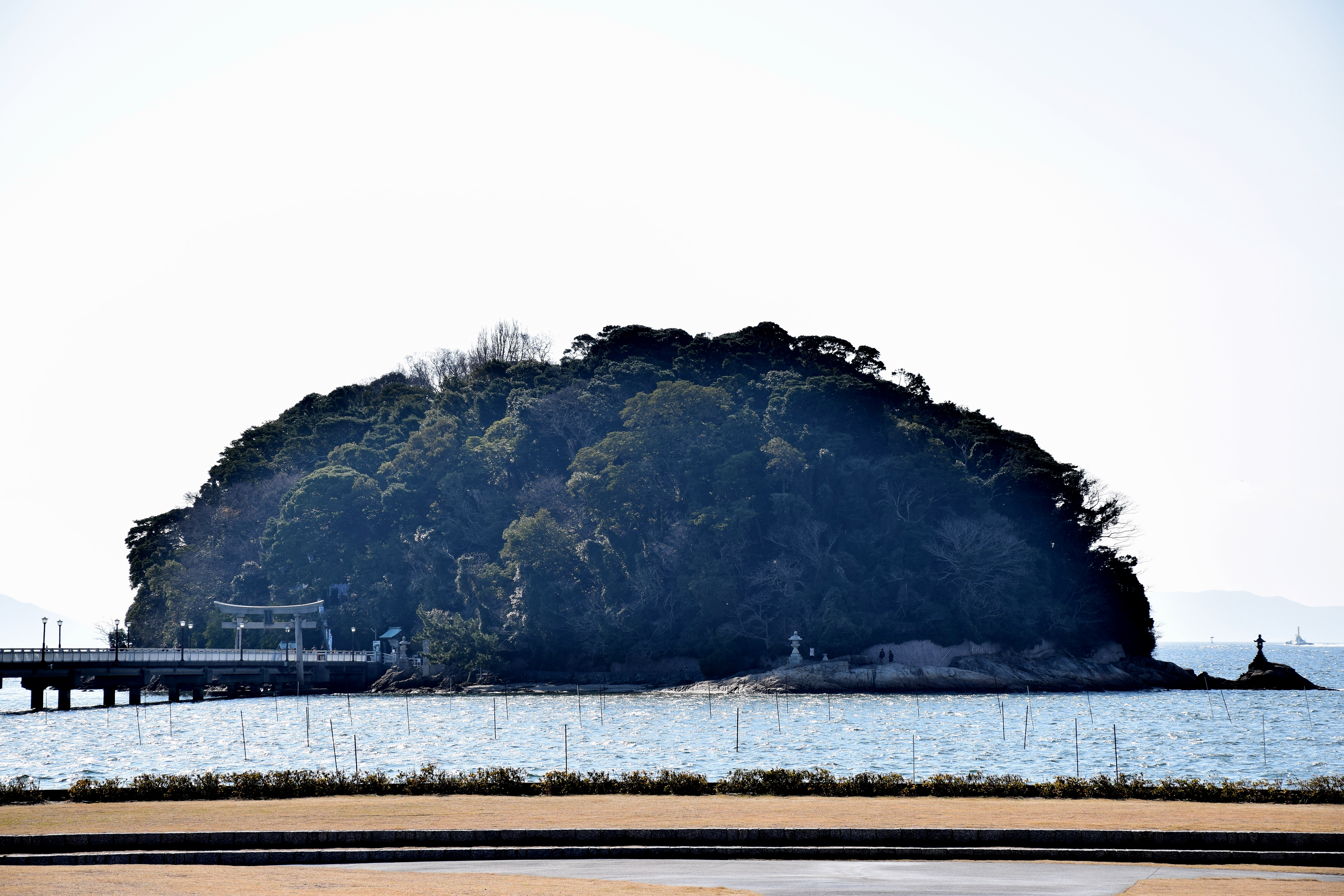 竹島（蒲郡市）